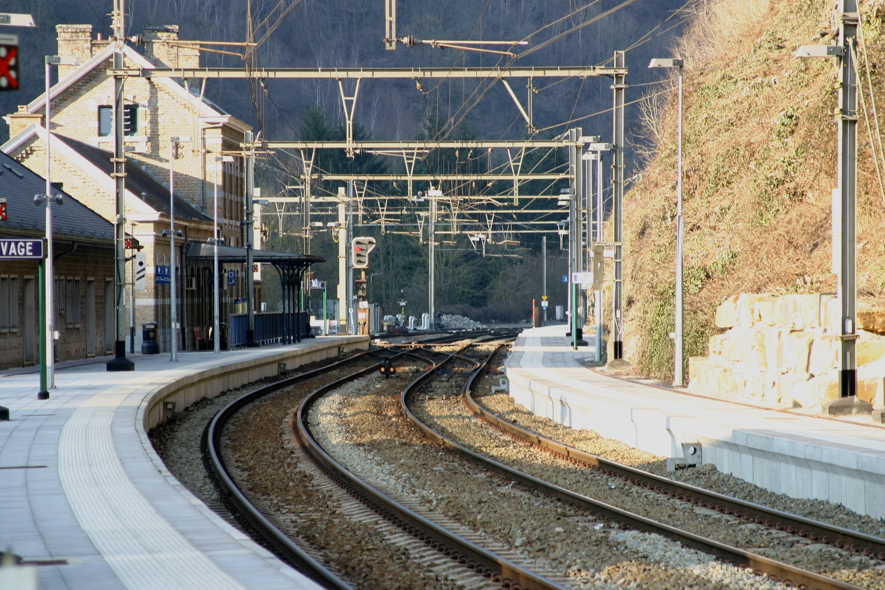 Gare vu Rivage a Richtung Léck gesinn.